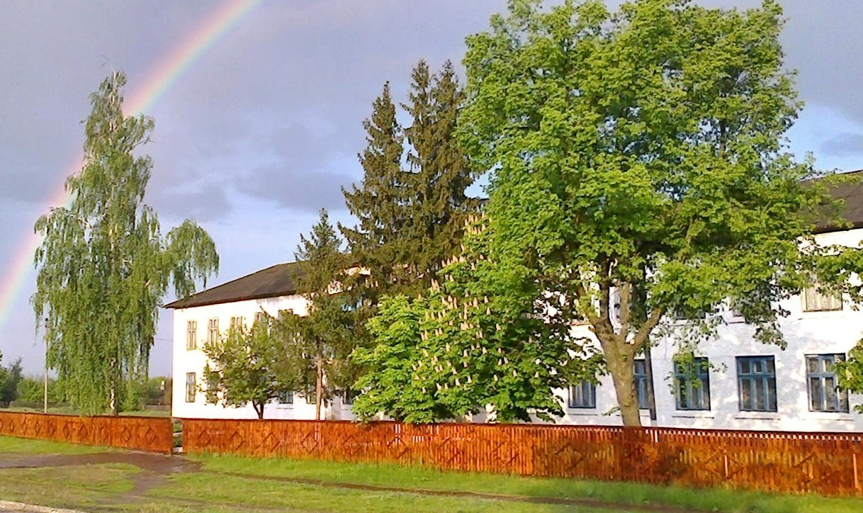 Школа